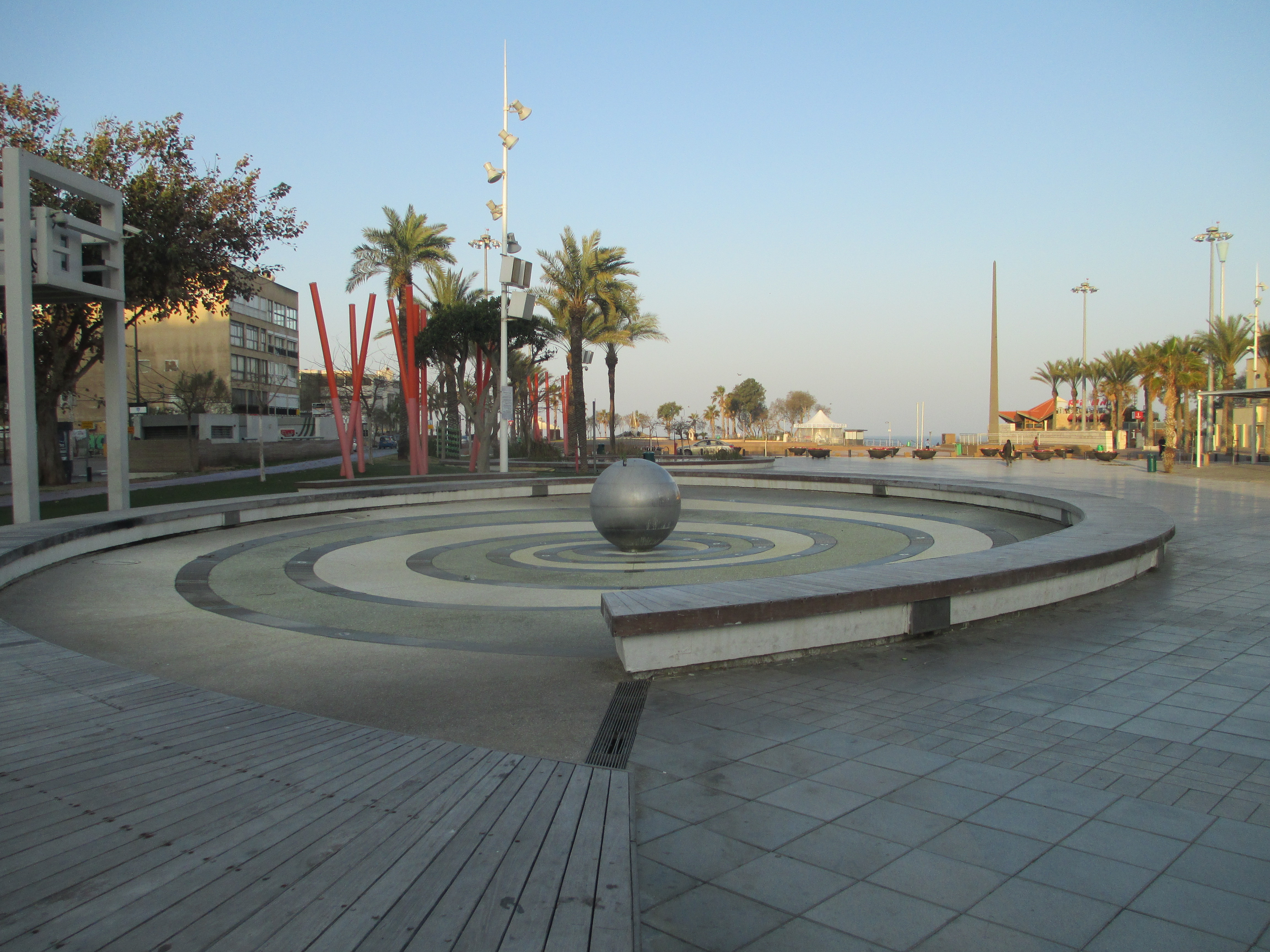 כיכר העצמאות בנתניה